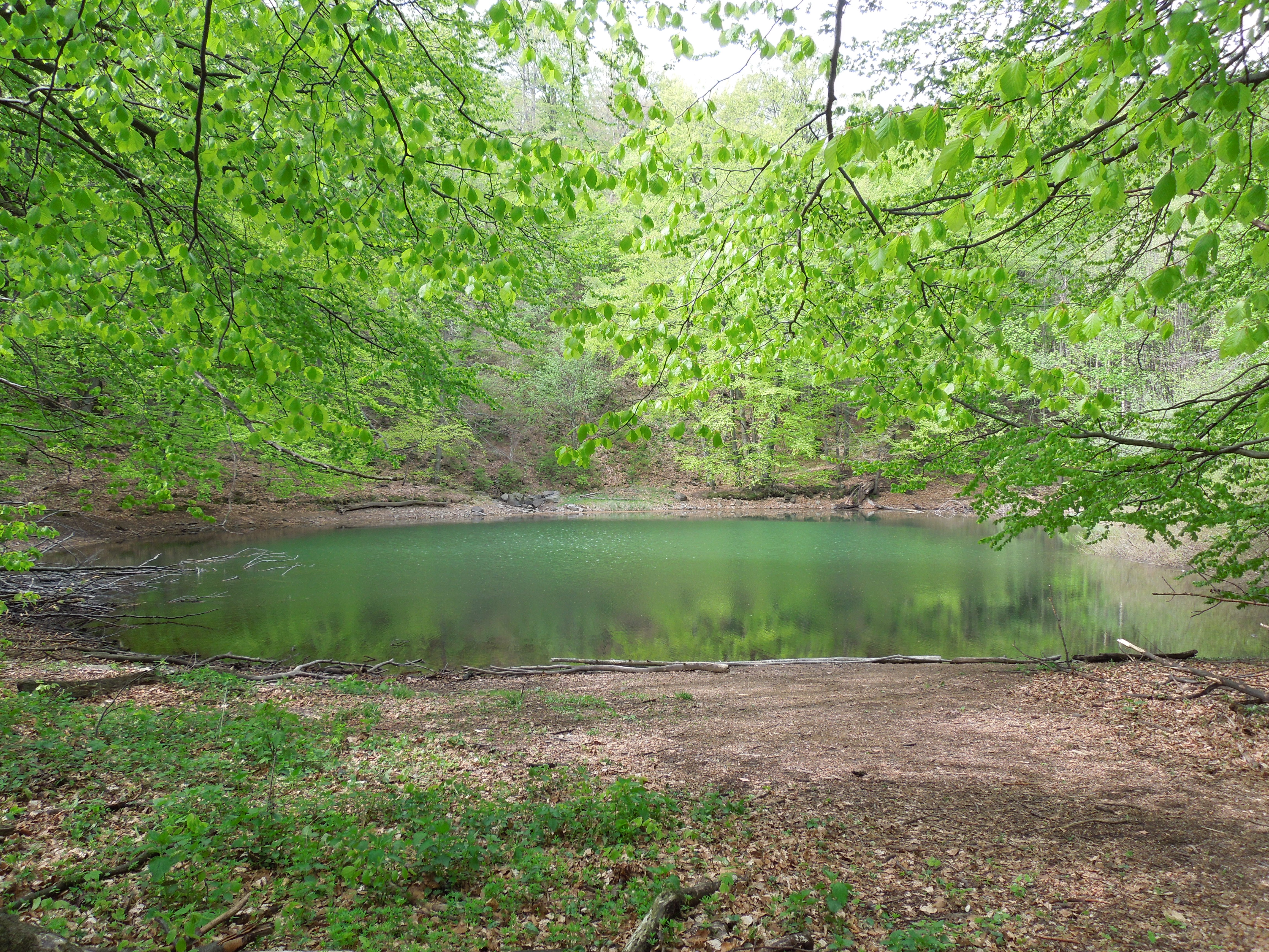 Malé Morské oko v apríli